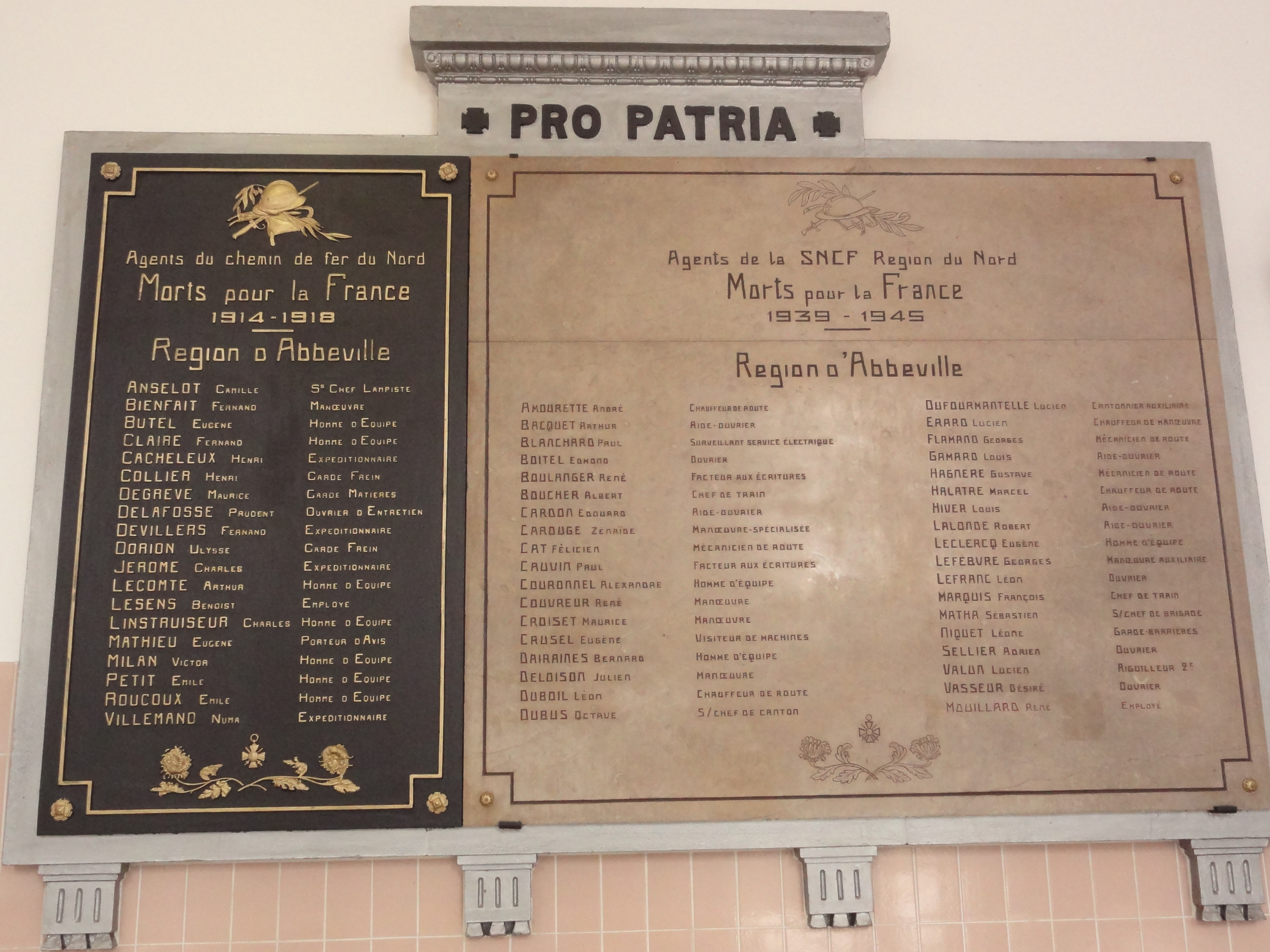 Abbeville (Somme) gare SNCF plaque guerre